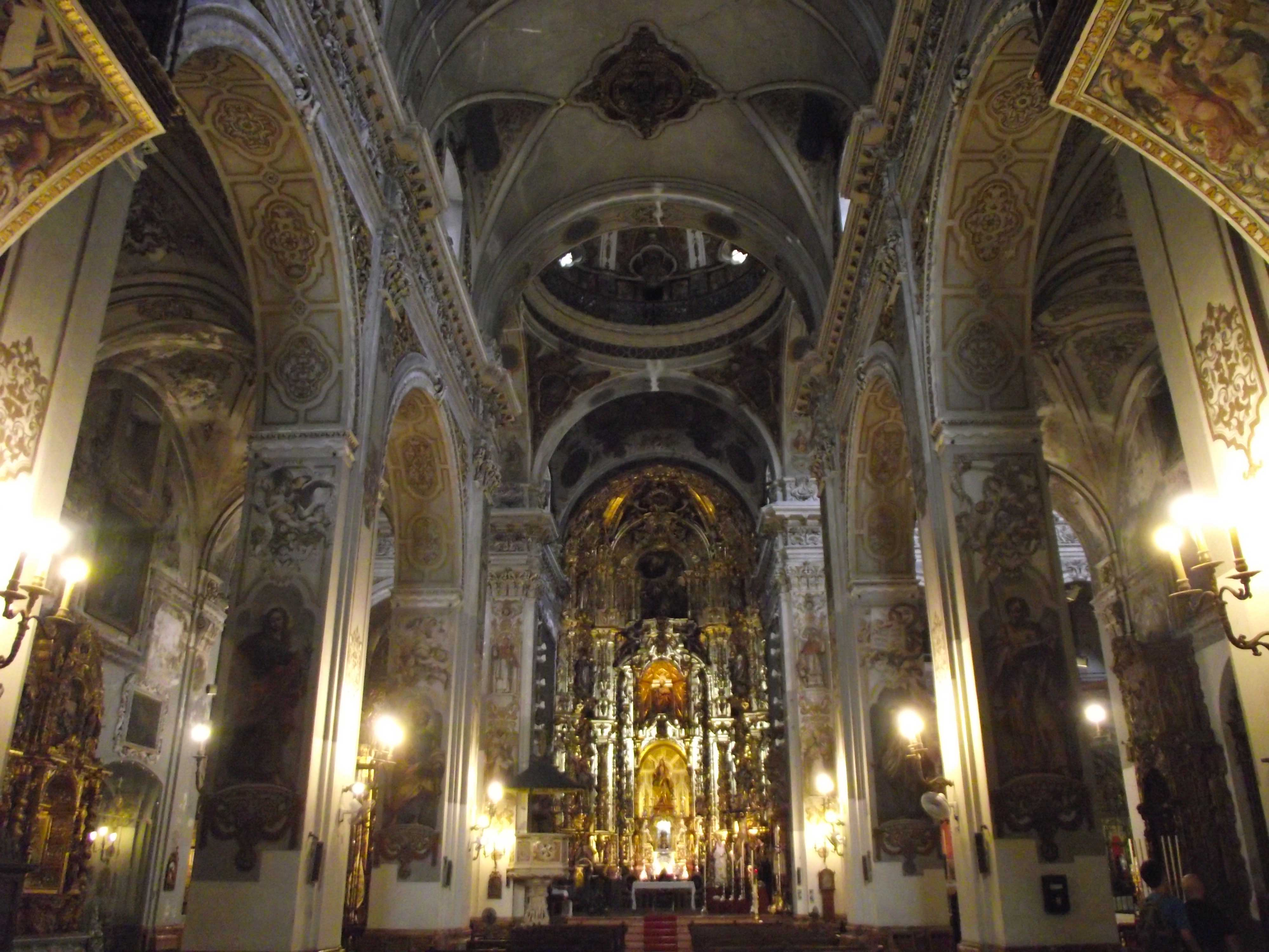 Sevilla, Iglesia de Santa María Magdalena, 1694-1724